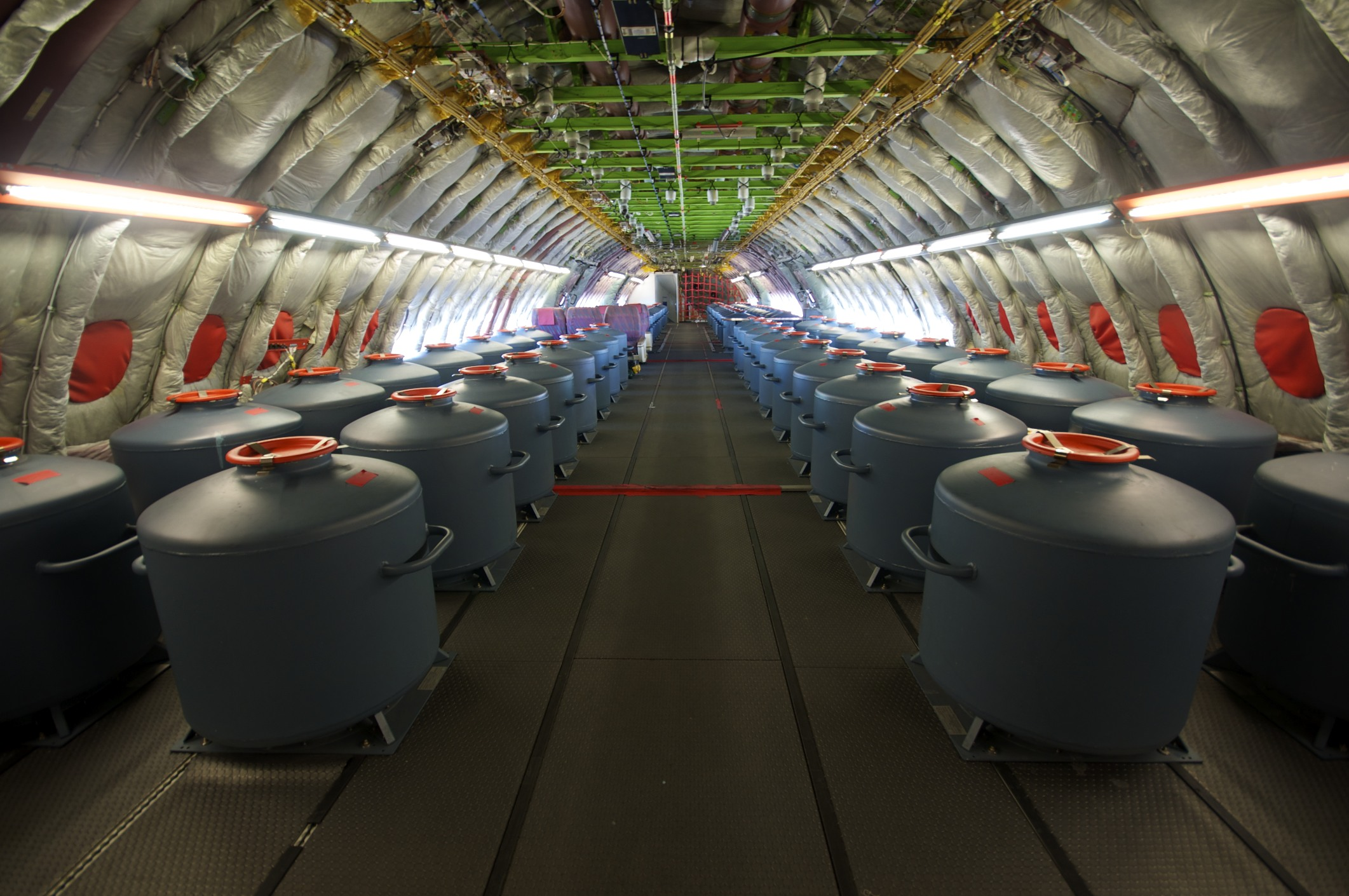 Ess tanques están llenos de agua y simulan peso de pasajeros para que el avion de pruebas tenga distintos pesos de despegue/aterrizaje/desplazamiento. Airbus A380 - MSN 004 - F-WWDD Registration: F-WWDD Serial number: 4 Test registration: F-WWDD Engines: 4 x GP7270 Location Ezeiza Min. Pistarini Airport - Argentina.